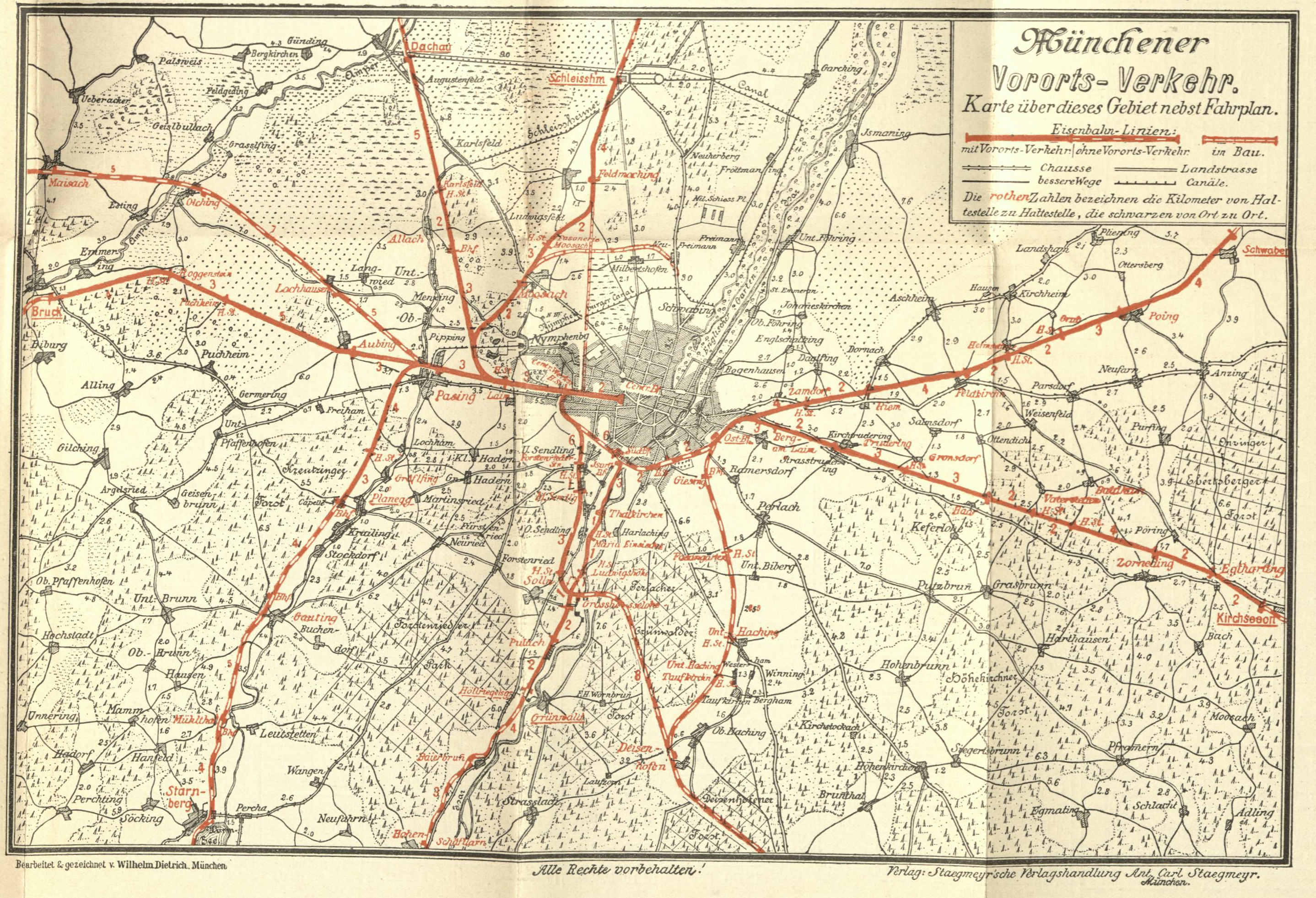 Münchner Vorortverkehr mit Preisverzeichniß und einer Terrainkarte: Ankunft und Abgang der sämmtlichen Eisenbahnzüge im Centralbahnhofe. Gültig ab 1. Mai 1898. Boarisch: A Koatn vom Mingarer Vorortvakea vu 1898, kuaz noch da Aöffnung vun eam 1896.